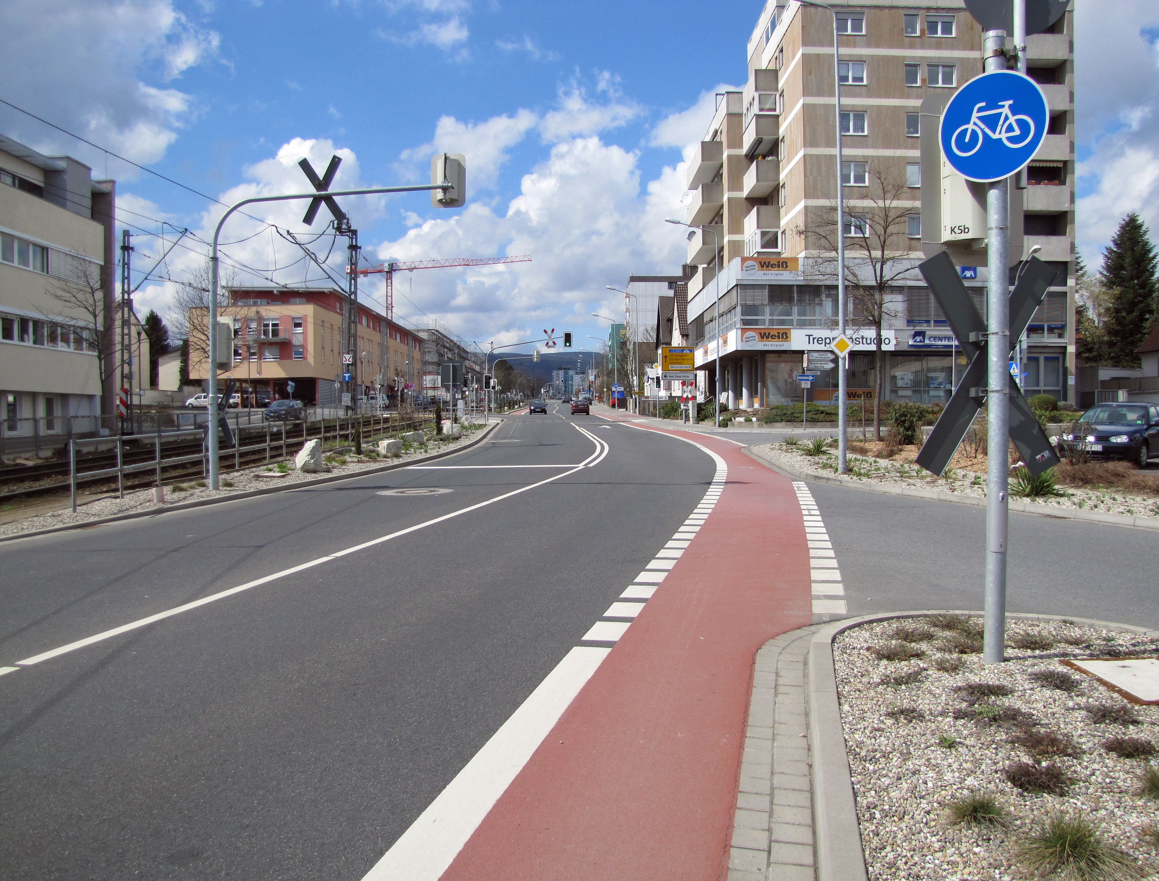 Radweg in Oberursel (2013), Richtung Hohemark.